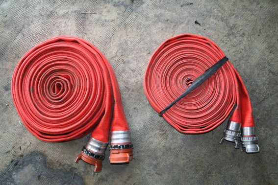 Tuyau de 45mmx20m et de 70mm x 20m des sapeur-pompiers français